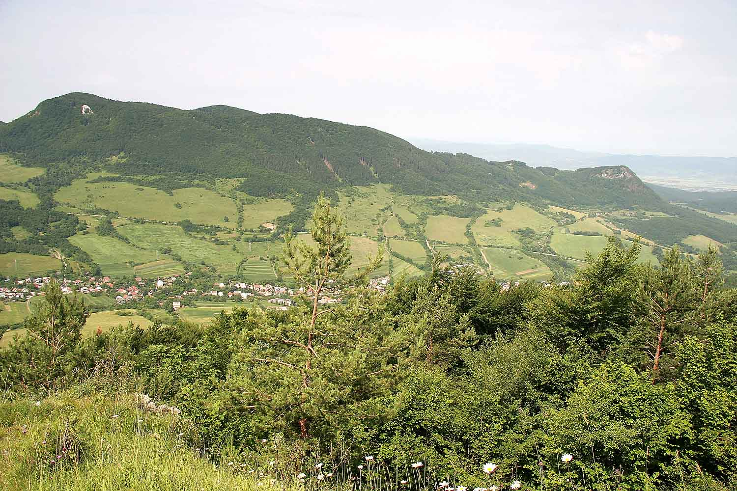 Holazne (901 m), Jedlovina (841 m) a Smrečkovci (682 m), Strážovské vrchy, district Ilava, Slovakia autor:Prazak Date: 27. 6. 2006